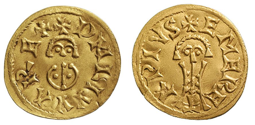 Imitación moderna (¿siglo XX?) de un tremis visigodo de oro acuñado en Mérida durante el reinado de Liuva II. Leyendas: anverso "+DN LIVVA RE+", reverso "+EMERETA PIVS" . Fuente: Ruth Pliego, La Moneda Visigoda, 2009, 939. Conservación: EBC+.